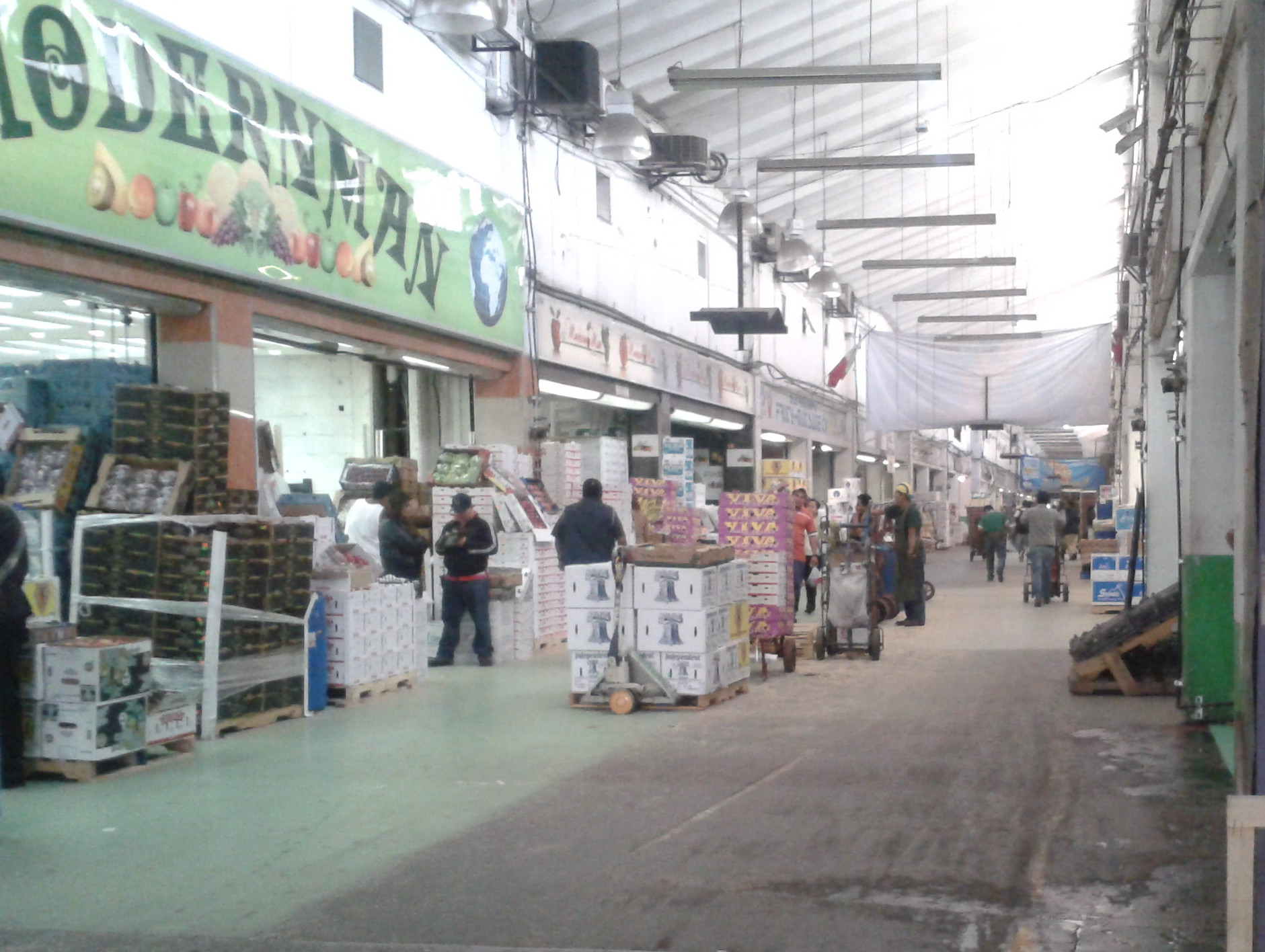 Vista del Pasillo K-L de la Central de Abasto de la ciudad de México en la zona de Frutas y Legumbres.